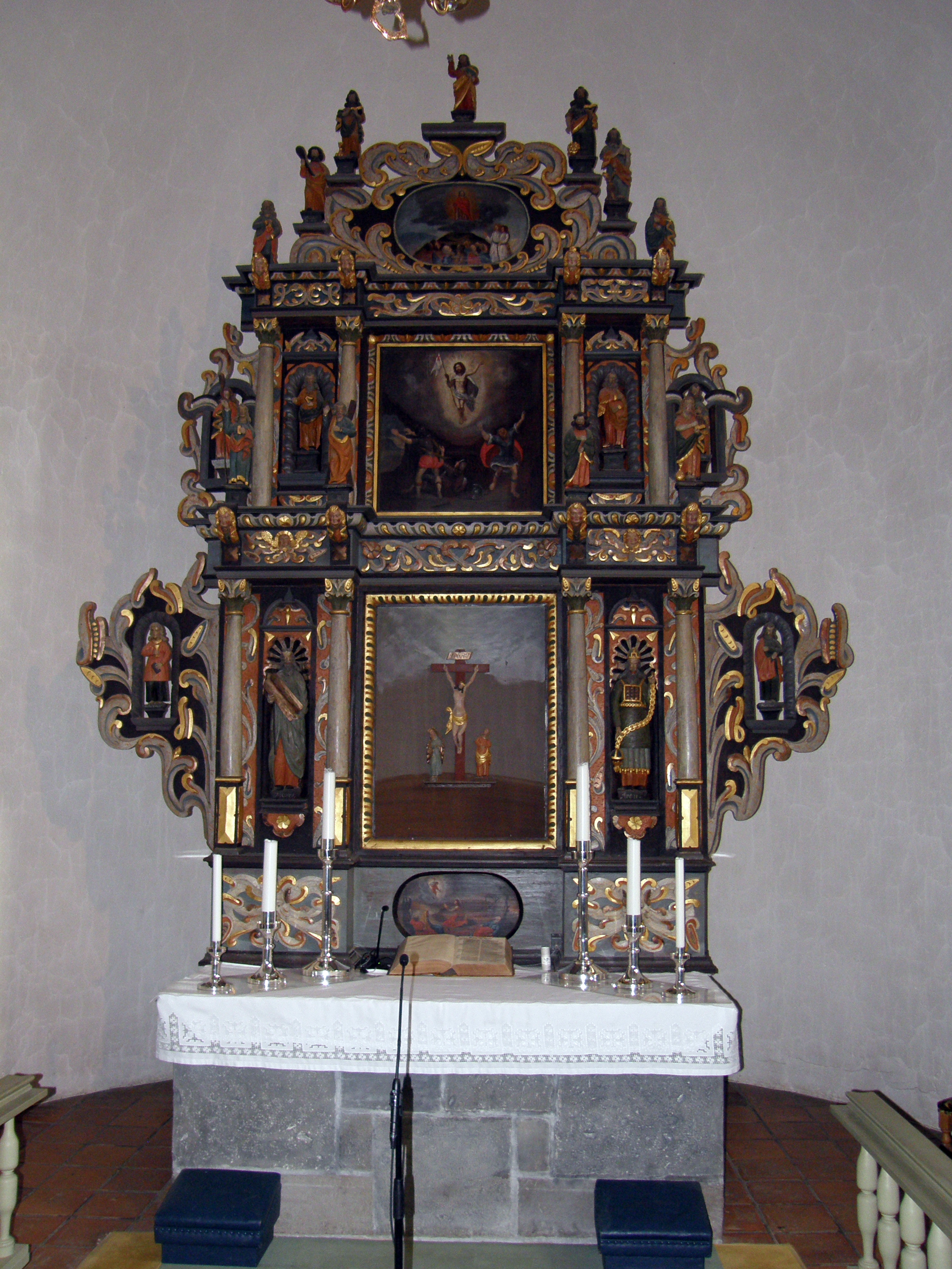 Norderhov kirke, Ringerike (altertavlen, ca. 1680)